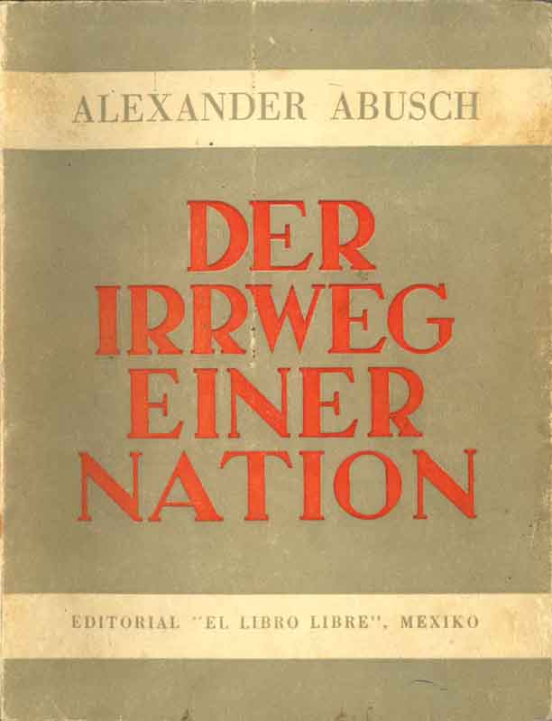 Alexander Abusch:Der Irrweg einer Nation. Ein Beitrag zum Verstaendnis deutscher Geschichte. Mexiko, El Libro Libre 1945. 252 S.